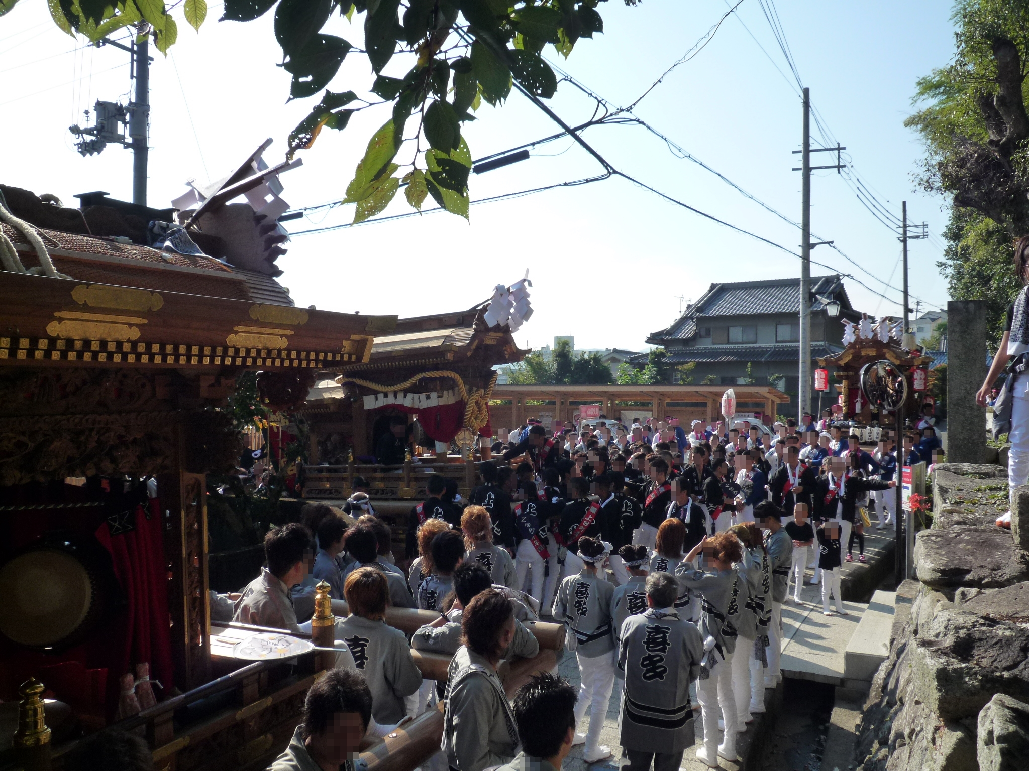 10月体育の日の前々日には、小塩・喜多・上田の順でそれぞれの氏子区の地車が宮入をします